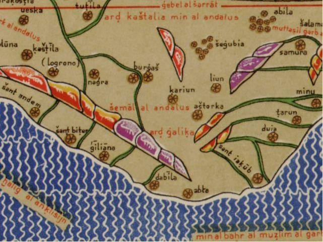 Detalle do noroeste da peninsula ibérica na Tábula Rogeriana de Al Idrisi, na transcrición latina de Konrad Miller de 1928. Pódese obter un mapa de detalle da Tábula Rogeriana na seguinte dirección á web da Libraría do Congreso dos EEUU.